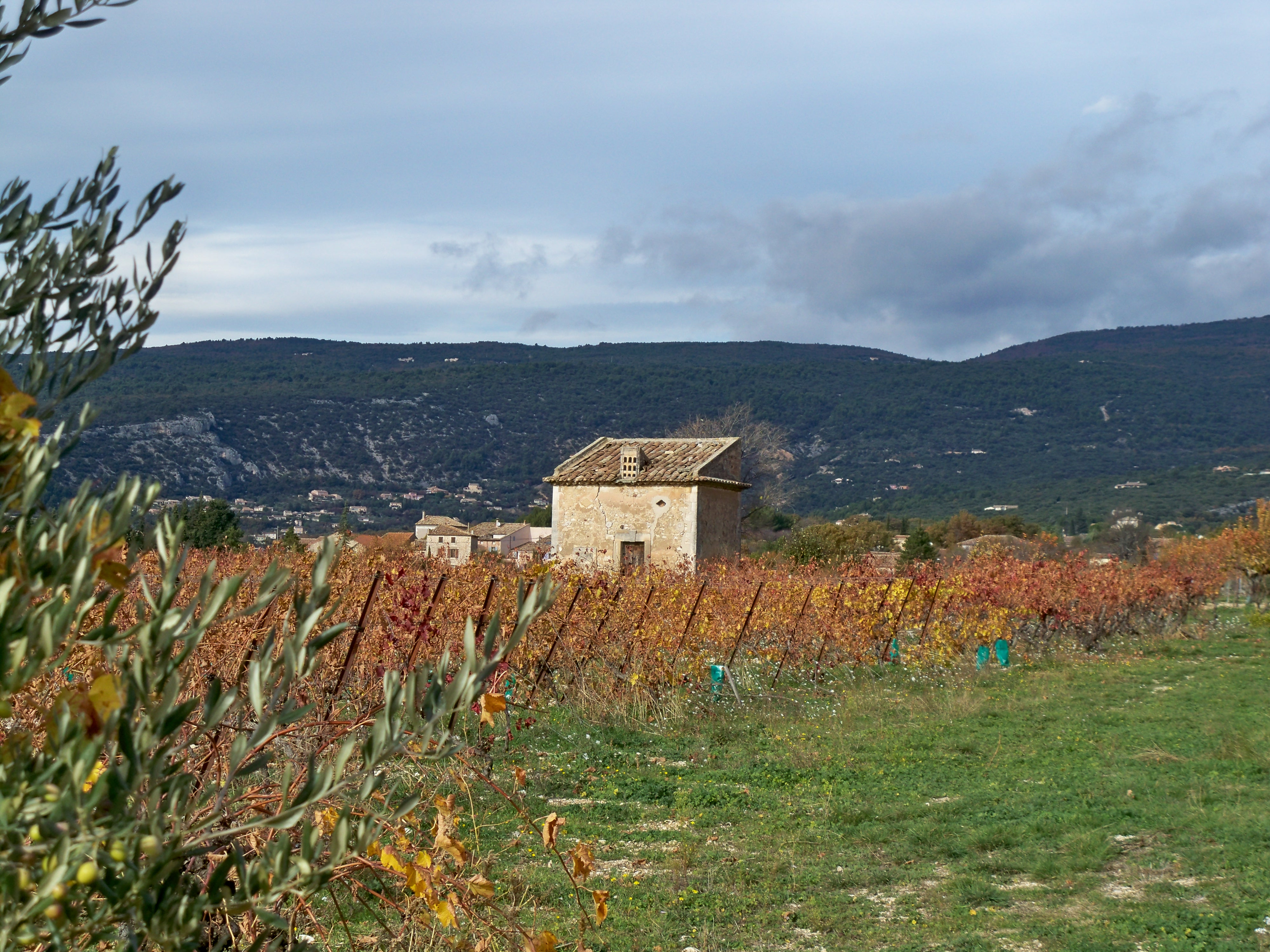 Cabanon avec pigeonnier en Luberon